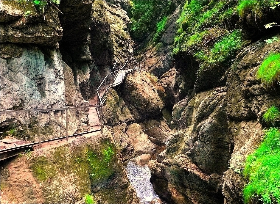 Die Starzlachklamm bei Sonthofen, an einem regnerischen Tag; Allgäu